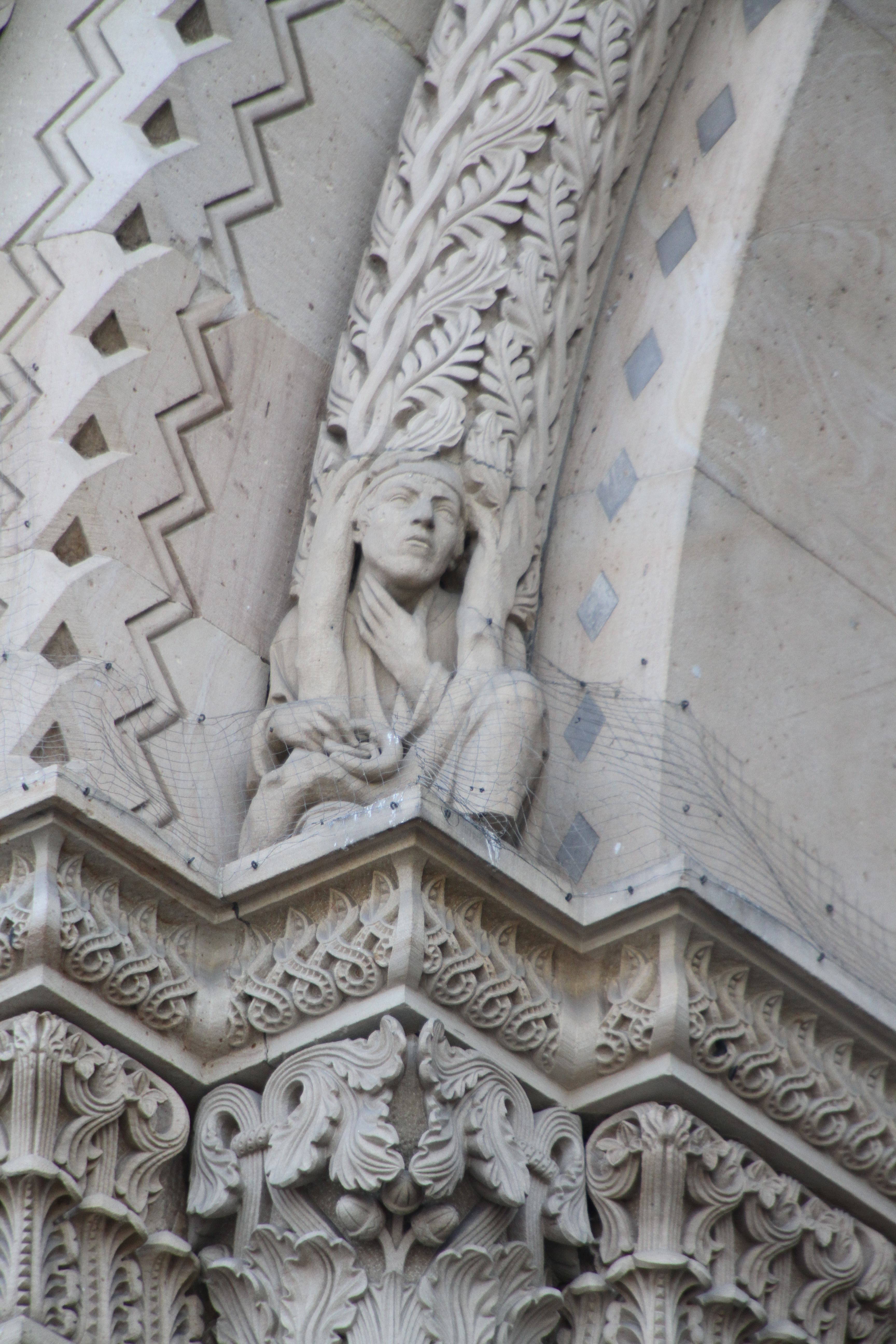 Trägerfigur mit Brezel von Gottfried Renn, Speyerer Dom